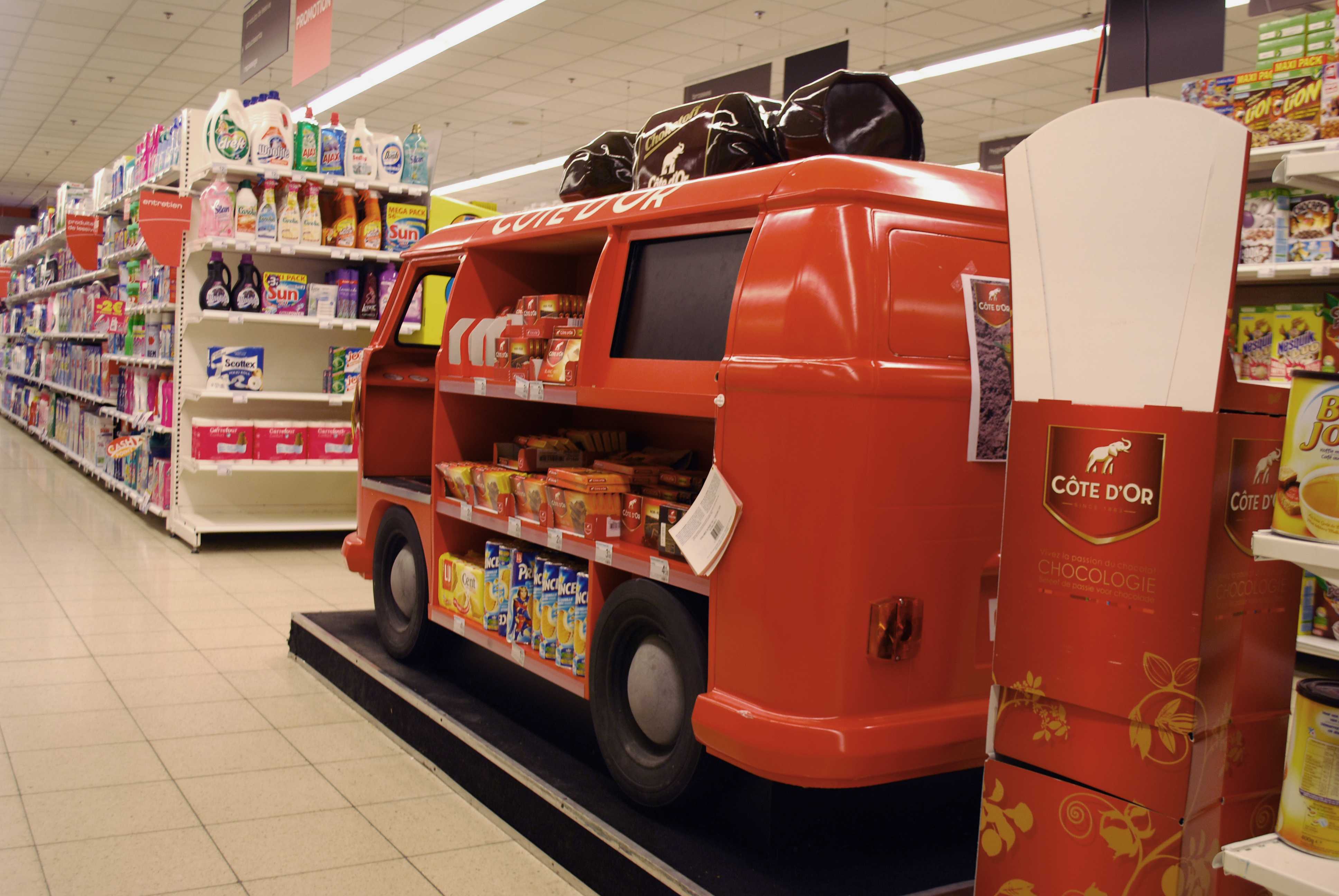 Vue d'un dispositif publicitaire des chocolats "Côte d'Or" au supermarché "Carrefour market" de Barvaux (Durbuy).